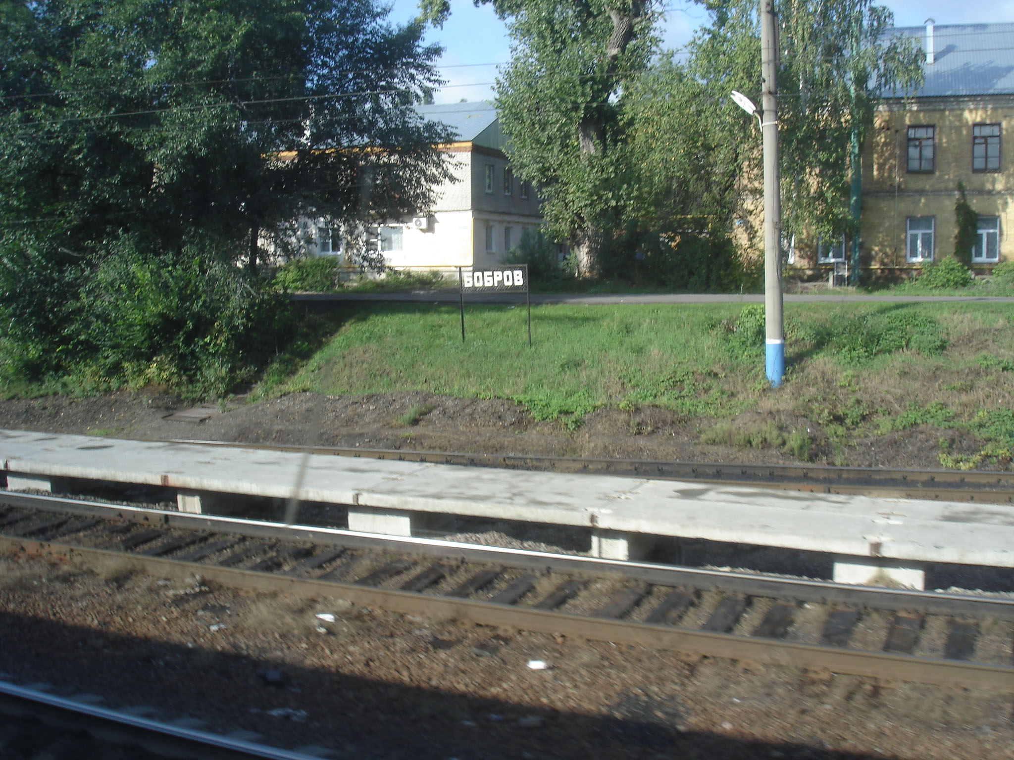 Информационная доска на ЖД-станции Бобров